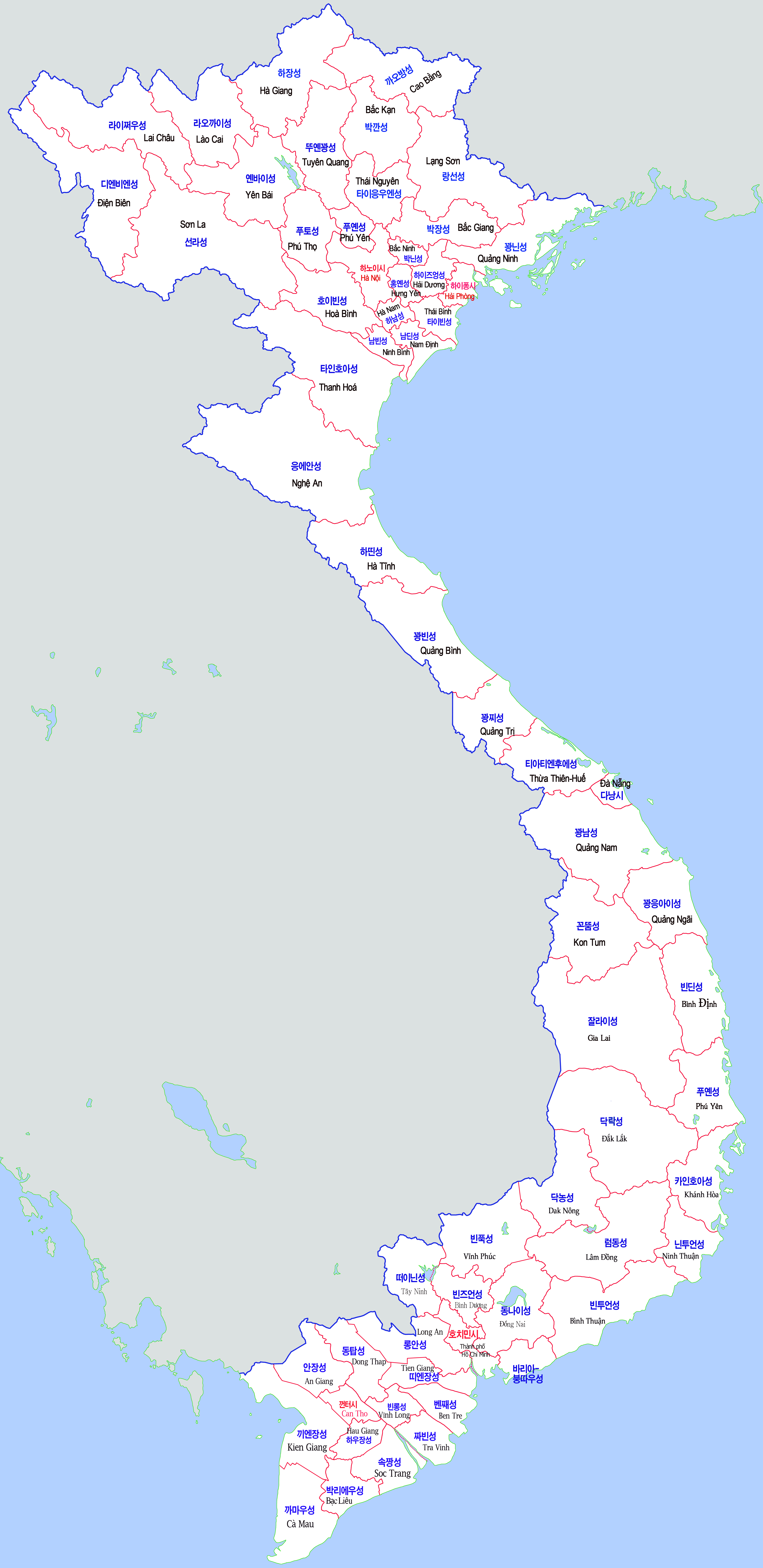 베트남 행정지도